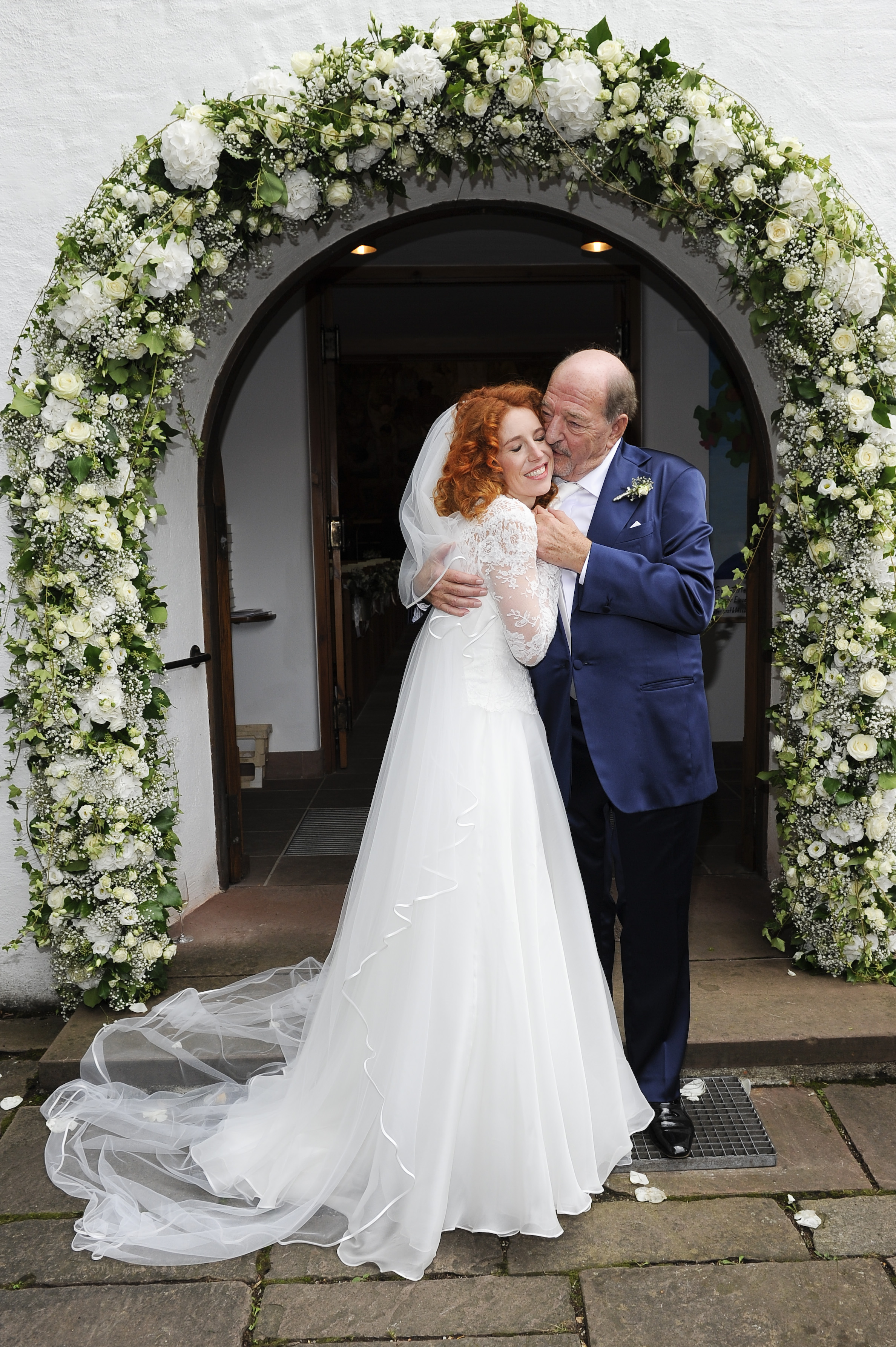 Brautpaar Ralph und Laura Siegel Kirchliche Trauung von Ralph Siegel und Frau Laura in der Thomaskirche in München-Grünwald am 15.09.2018